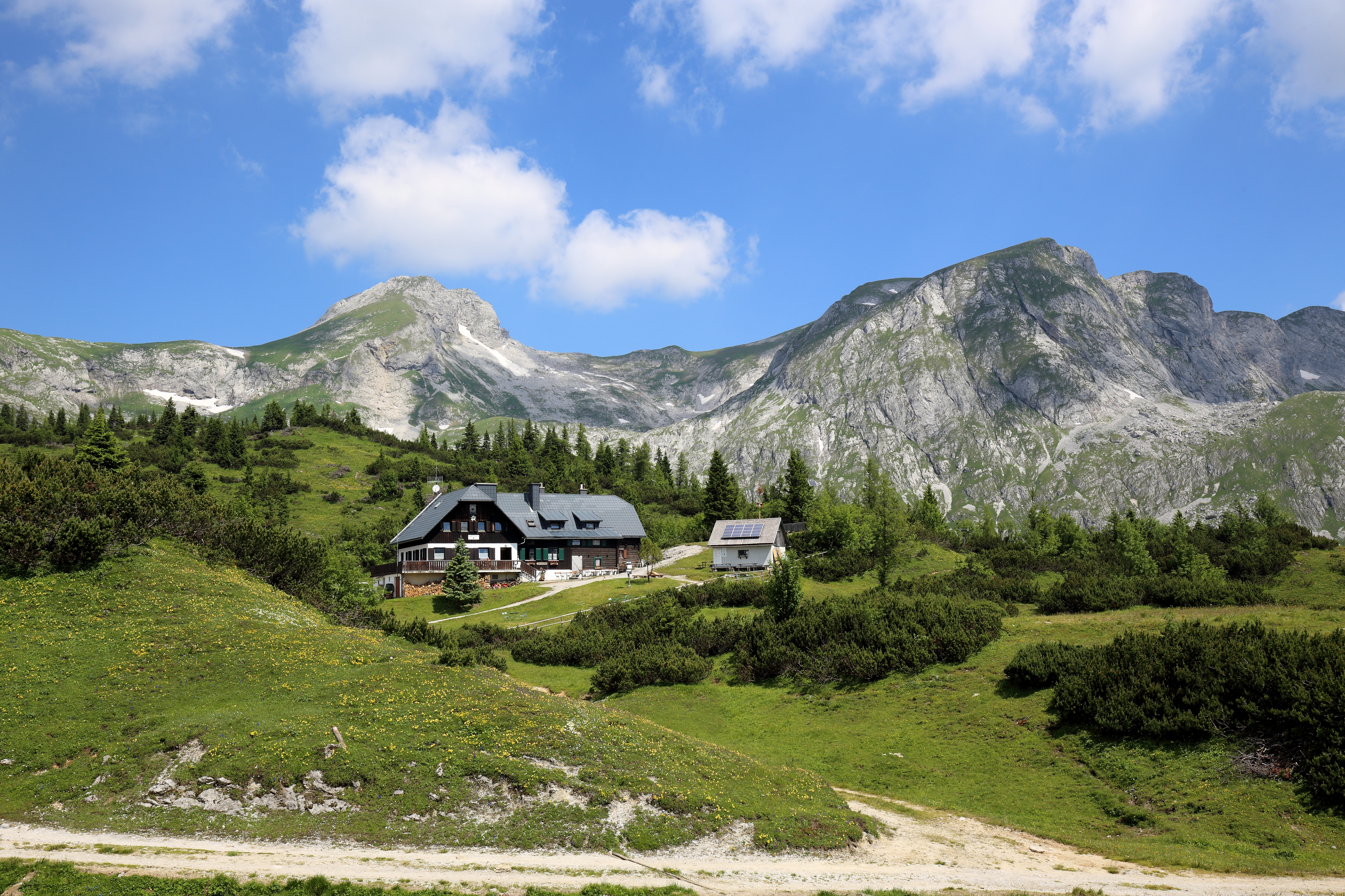 Die Sonnschienalm mit der Sonnschienhütte auf dem Hochschwabmassiv der Nördlichen Kalkalpen in der Steiermark. Links im Hintergrund der Ebenstein und rechts der Vorderer sowie Hintere Polster.